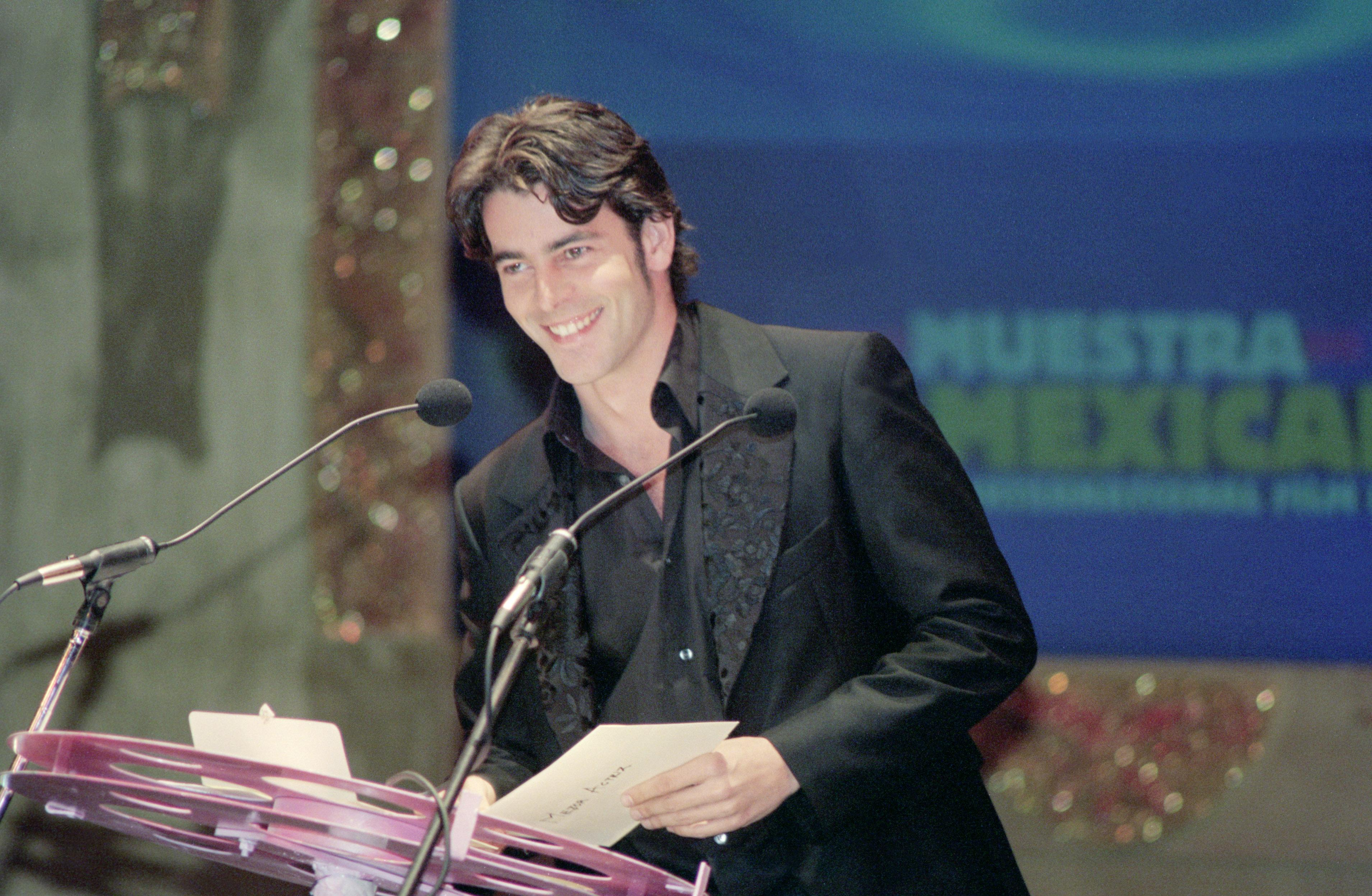 Eduardo Noriega